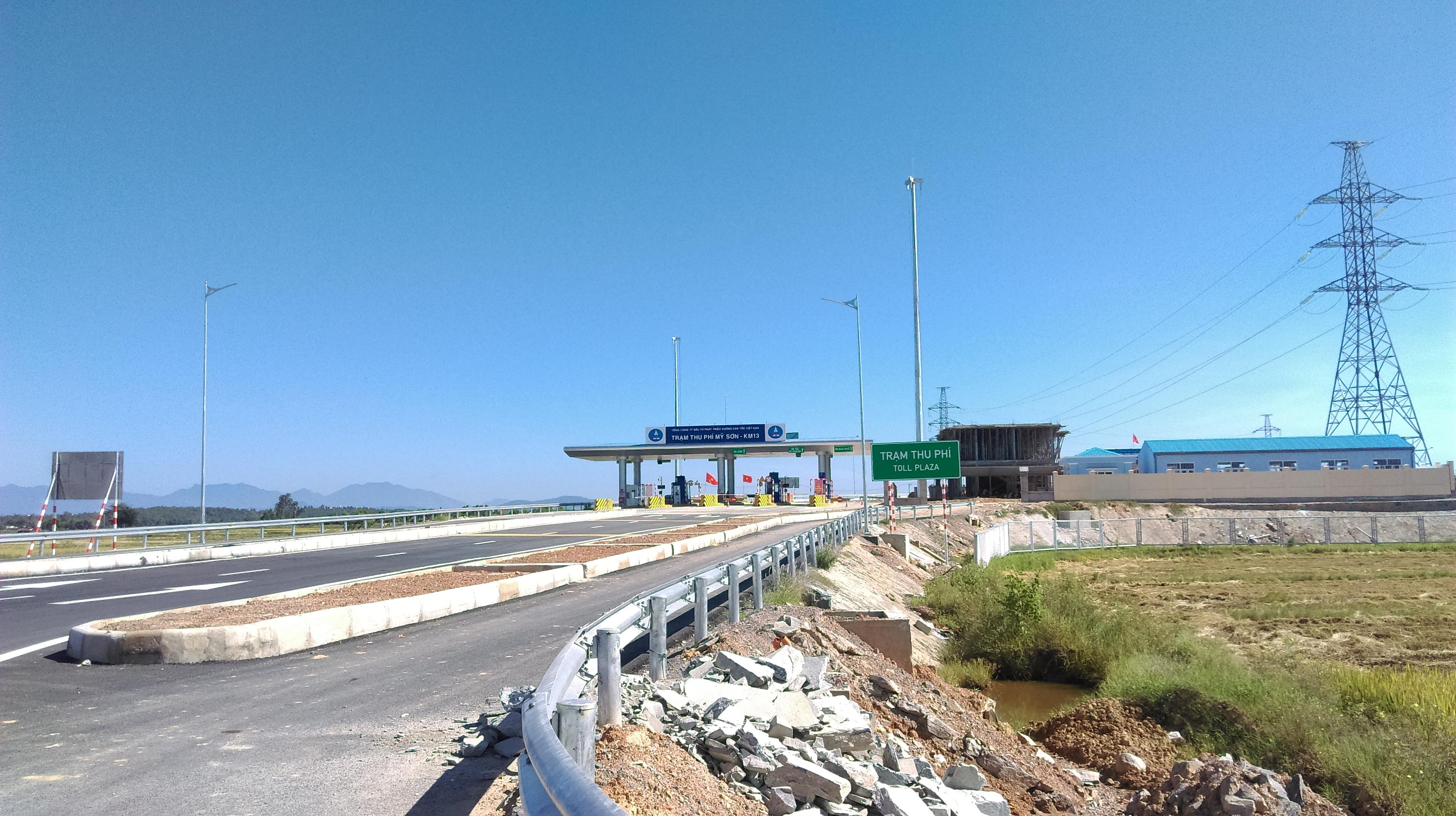 Trạm Thu phí Phong Thử, Điện Thọ, Điện Bàn, Quảng Nam